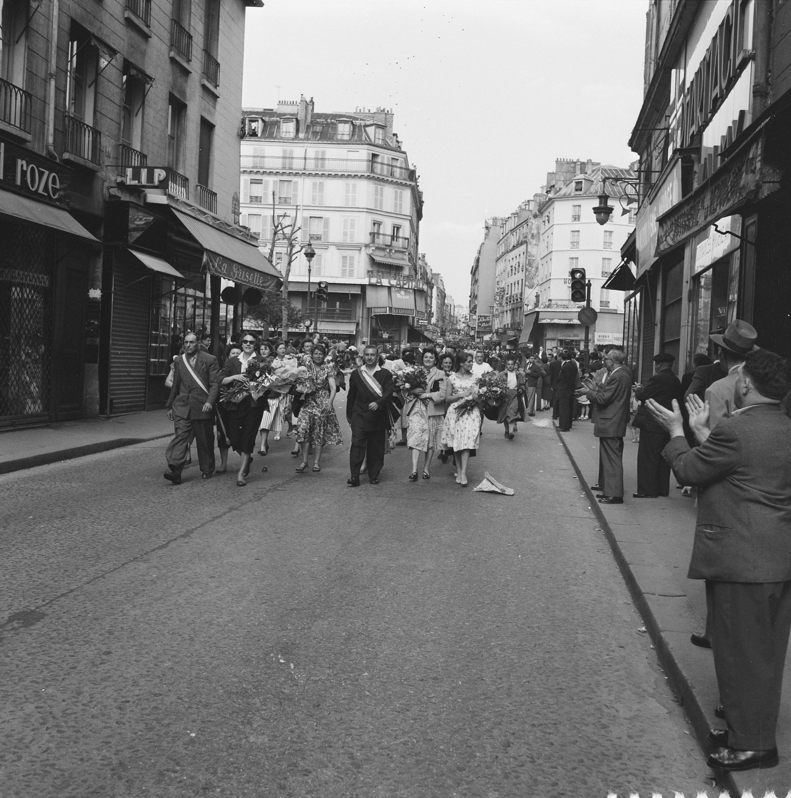 Collectie / Archief : Fotocollectie Anefo Reportage / Serie : [ onbekend ] Beschrijving : Demonstraties in Parijs t.g.v. en voor De Gaulle Datum : 1 juni 1958 Locatie : Frankrijk, Parijs Trefwoorden : DEMONSTRATIES Persoonsnaam : Gaulle, Charles de Fotograaf : Behrens, Herbert / Anefo Auteursrechthebbende : Nationaal Archief Materiaalsoort : Negatief (zwart/wit) Nummer archiefinventaris : bekijk toegang 2.24.01.03 Bestanddeelnummer : 909-6034